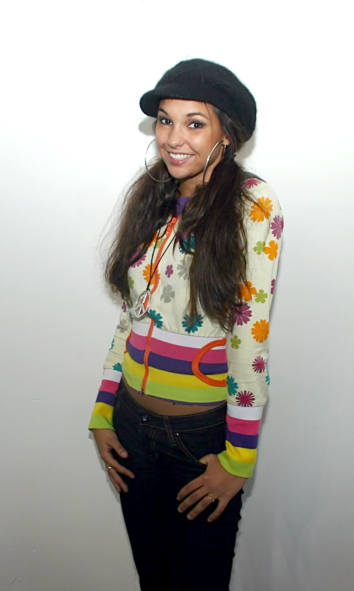 Rania Zeriri am Wikipedia-Stand auf der Jugendmesse YOU.